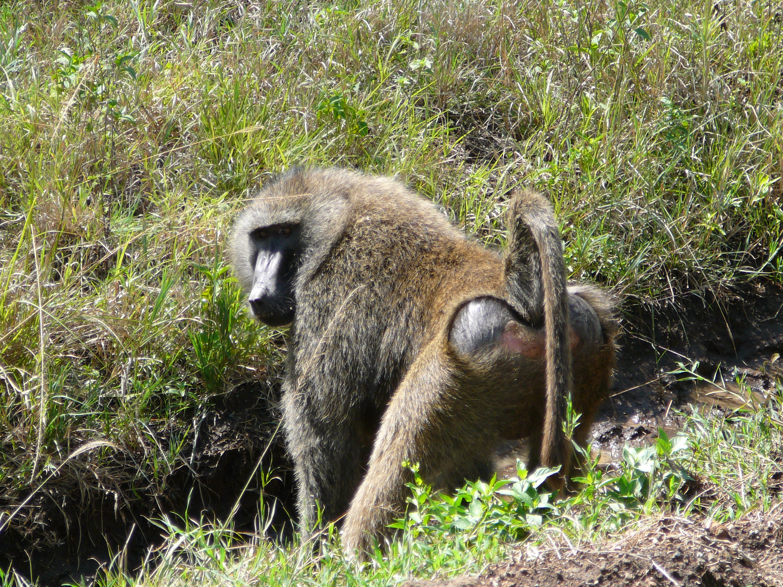 Olive Baboon (Papio anubis) in Kenya